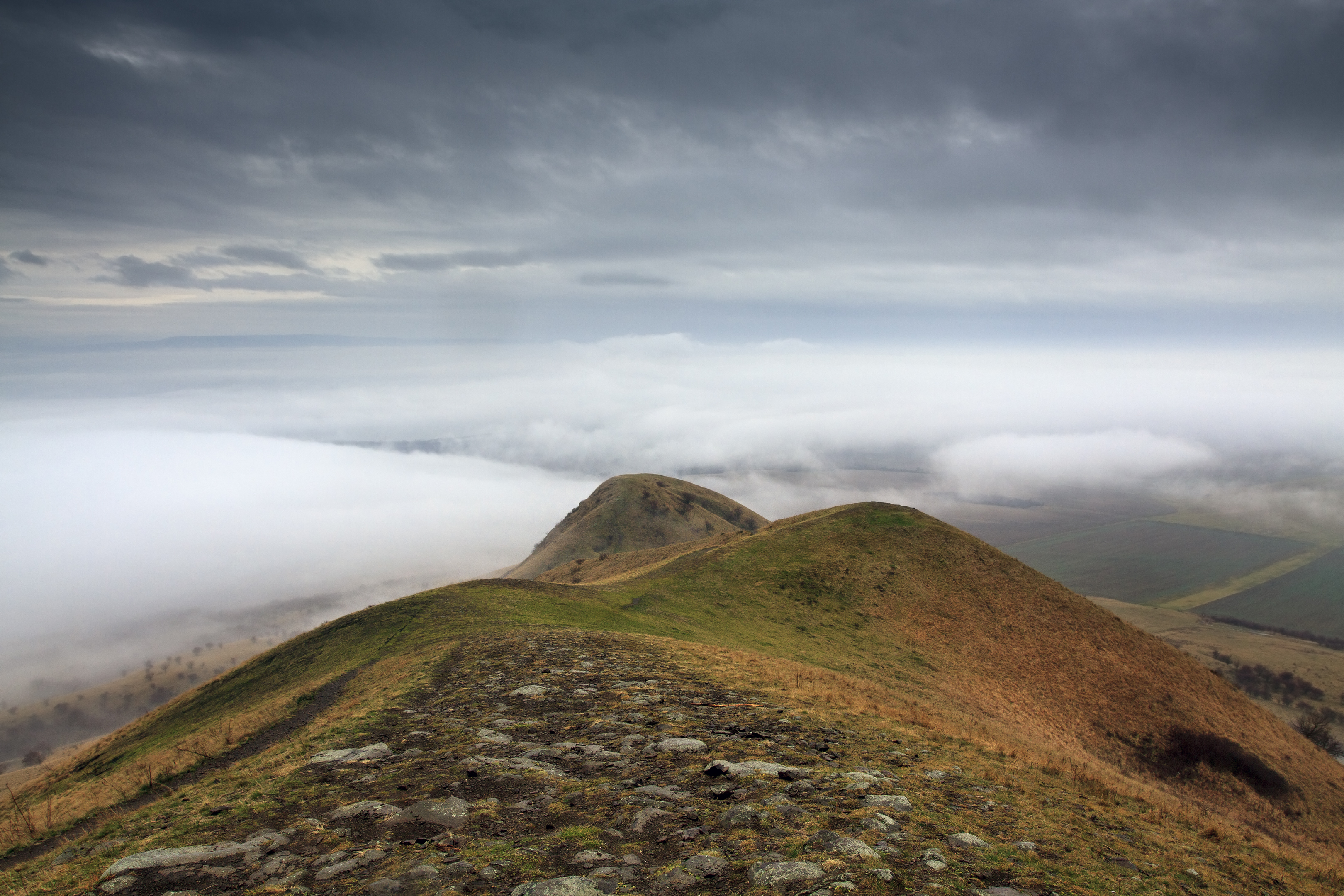 NPR Raná